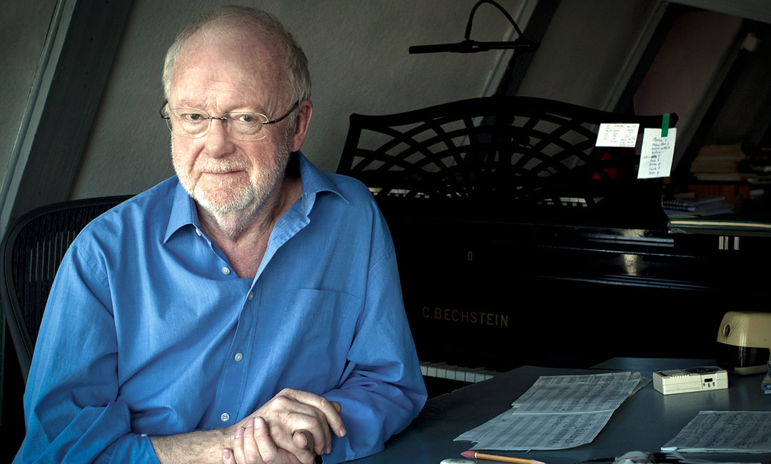 Louis Andriessen